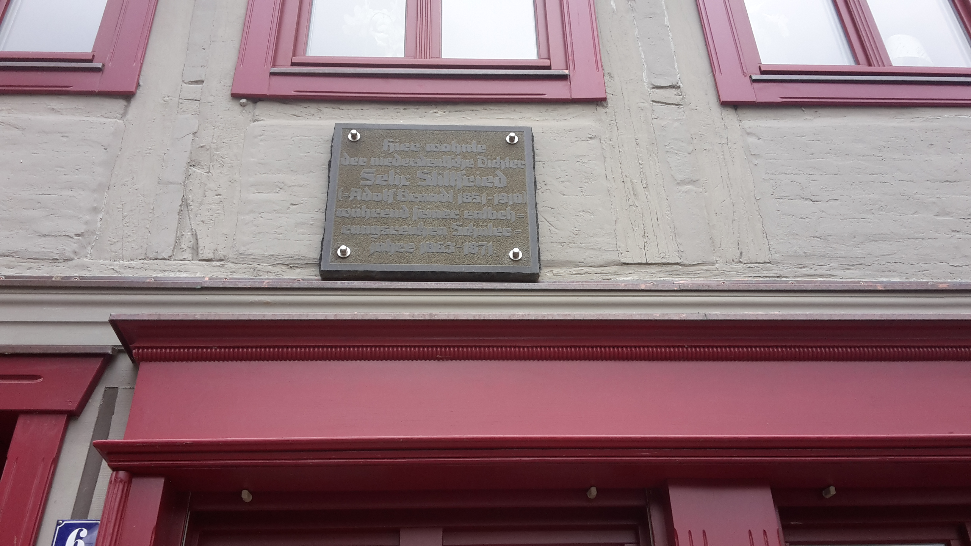 Wohnhaus von Felix Stillfried in der Fischerstraße 6, Schwerin